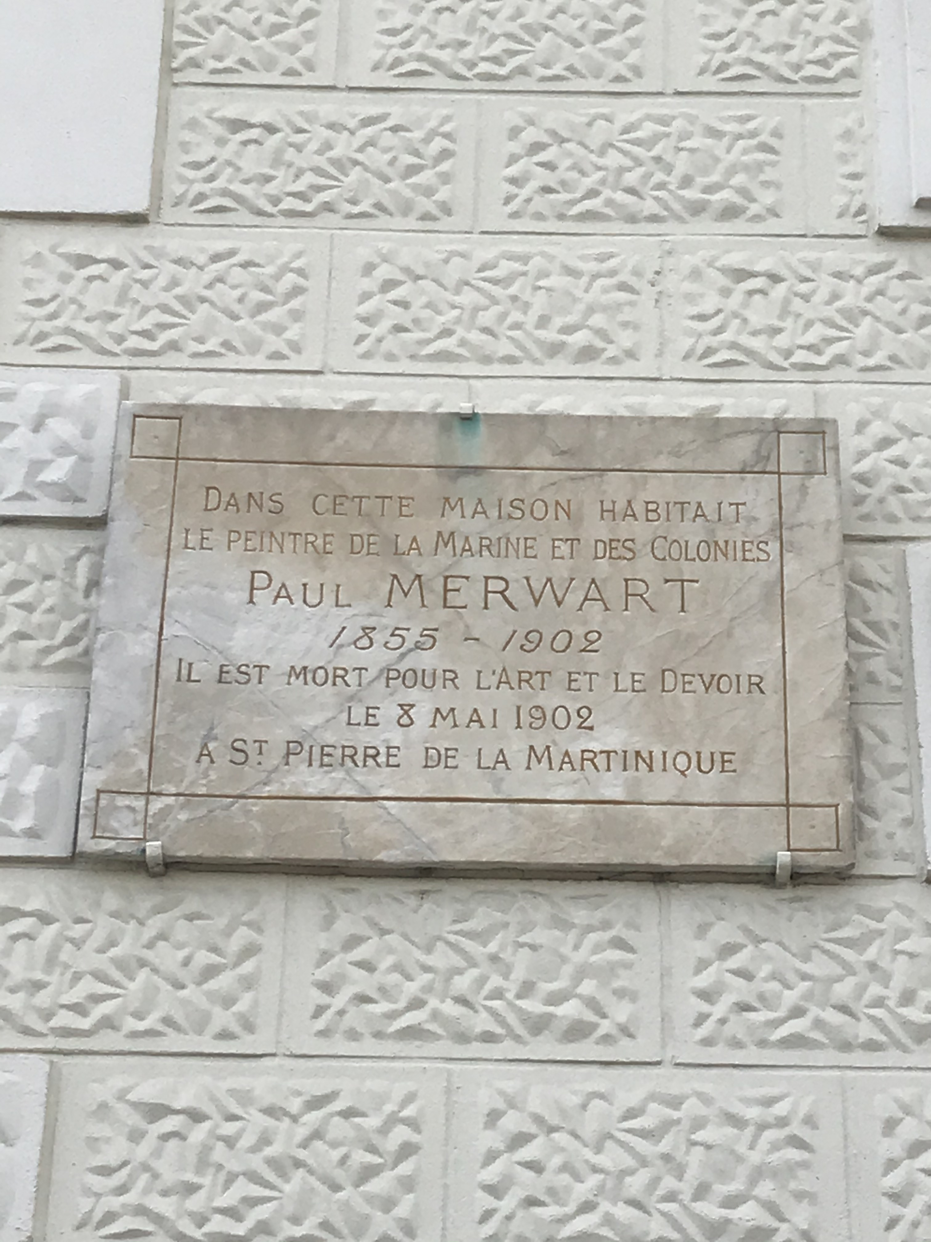 Plaque posée en façade de la maison où le peintre résidait à Fontainebleau, rue Pierre-Charles Comte